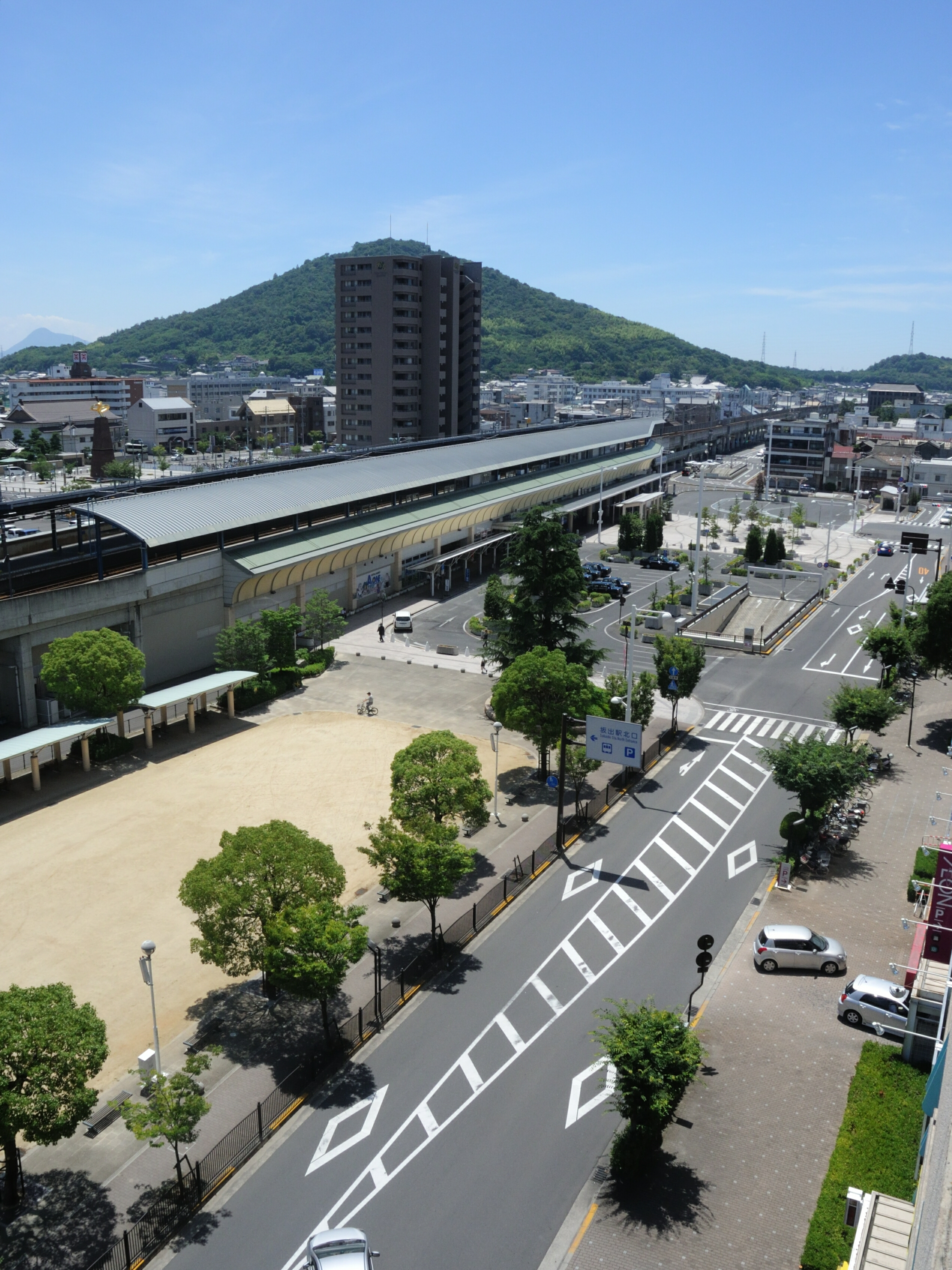 坂出駅と駅前風景 - 香川県ja:坂出市